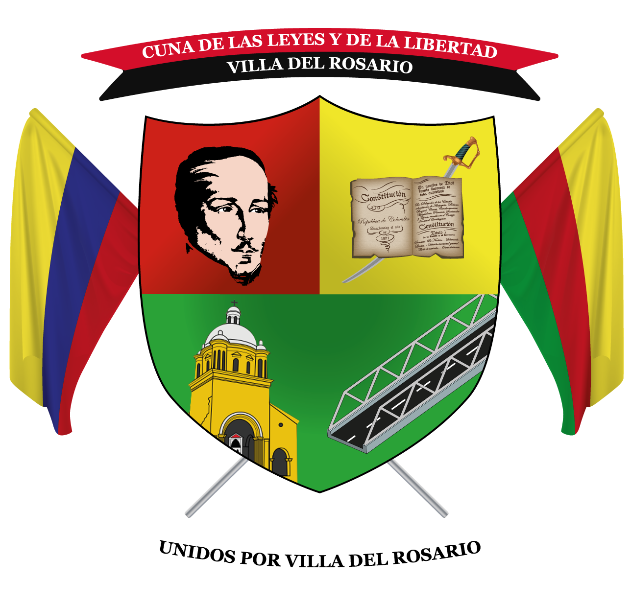 Escudo alternativo no oficial del municipio de VIlla del Rosario, Norte de Santander, Colombia.